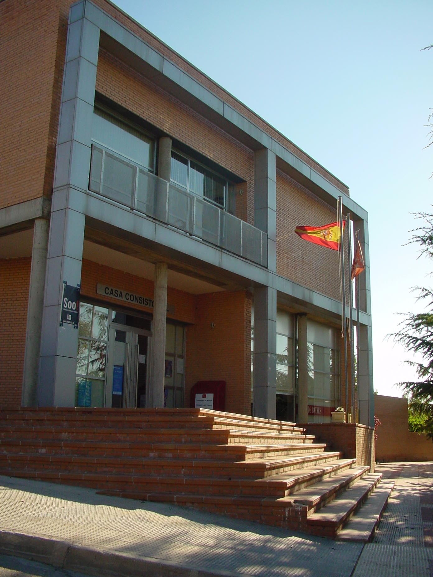 Ayuntamiento de Batres.